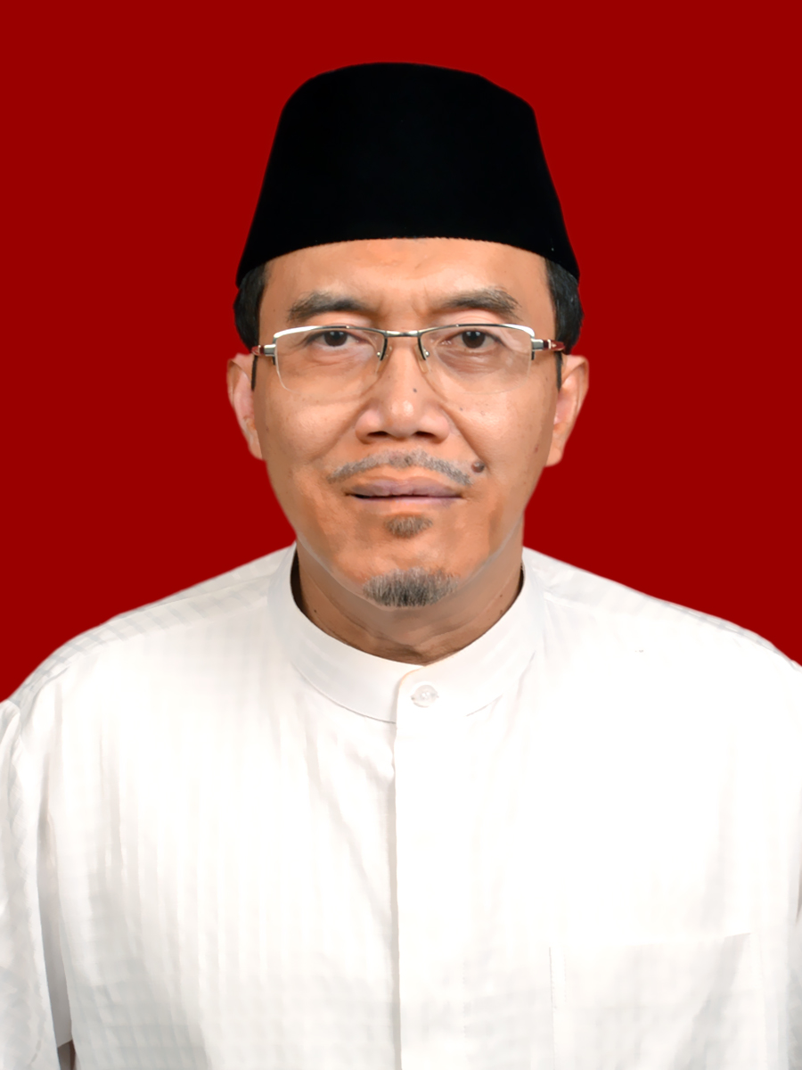 Calon Kepala Derah Brebes 2017